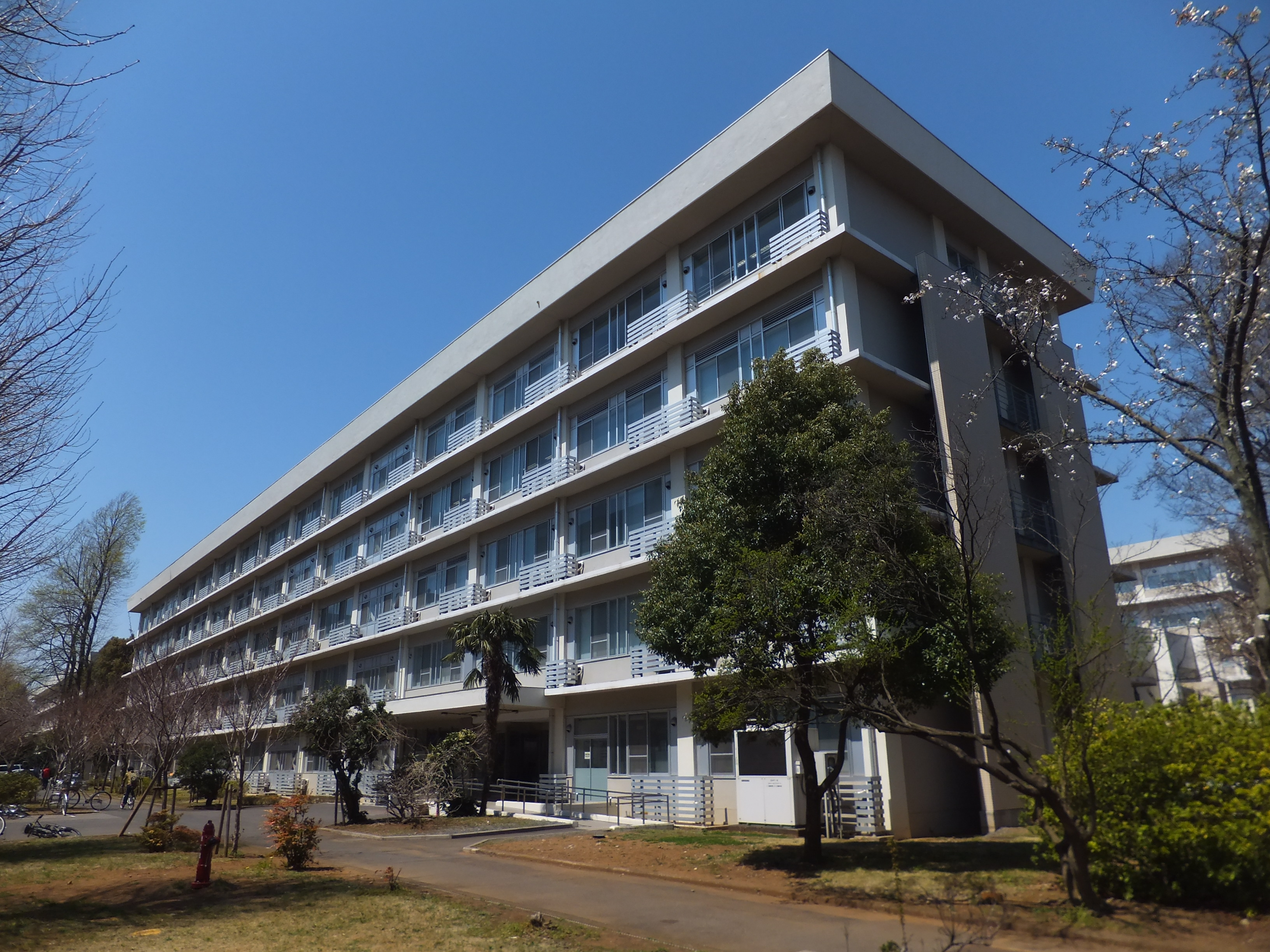 千葉大学西千葉キャンパス、総合校舎A号館